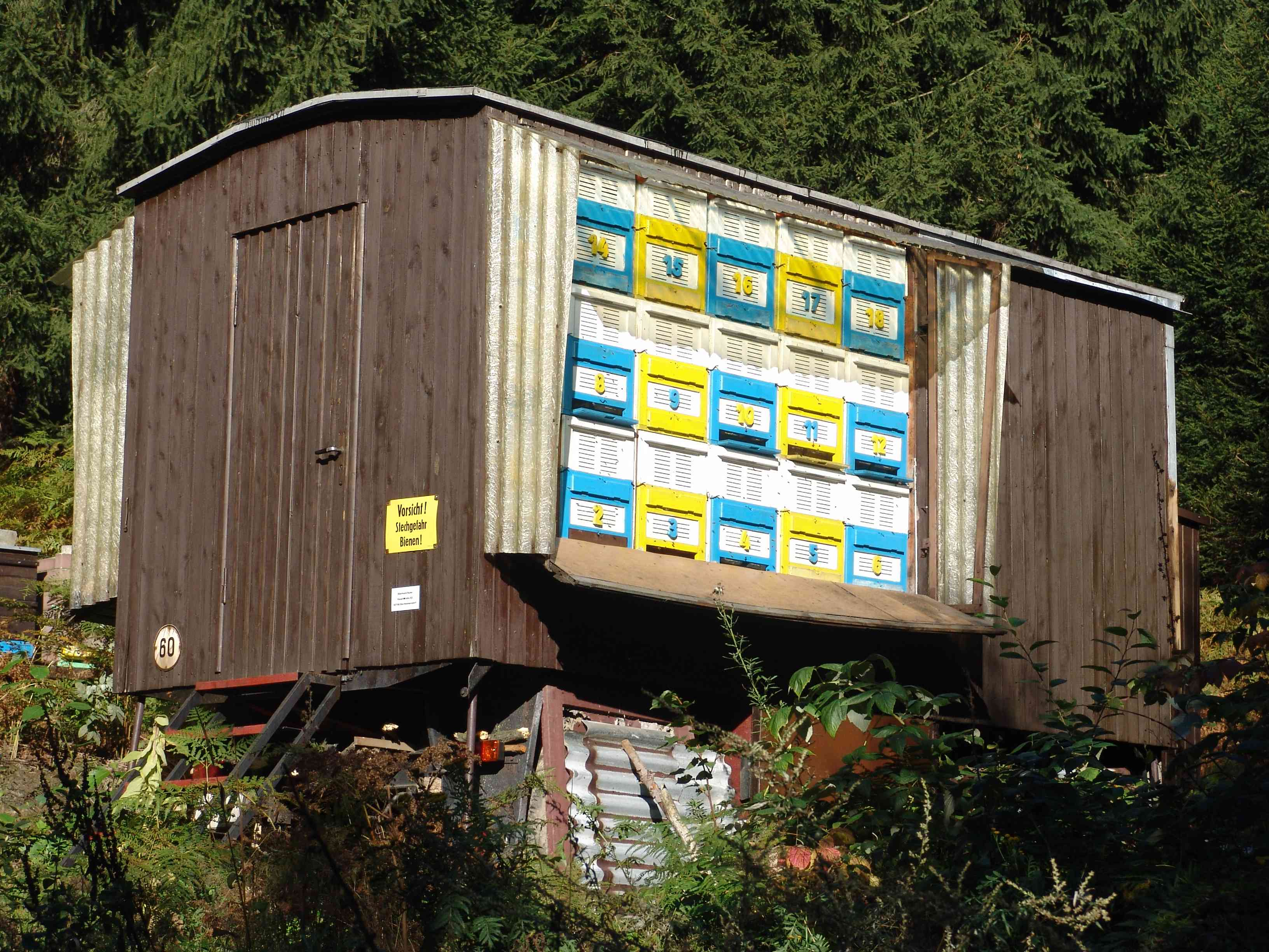 Bienenwagen nahe den Schewitzteichen in Dürrhennersdorf